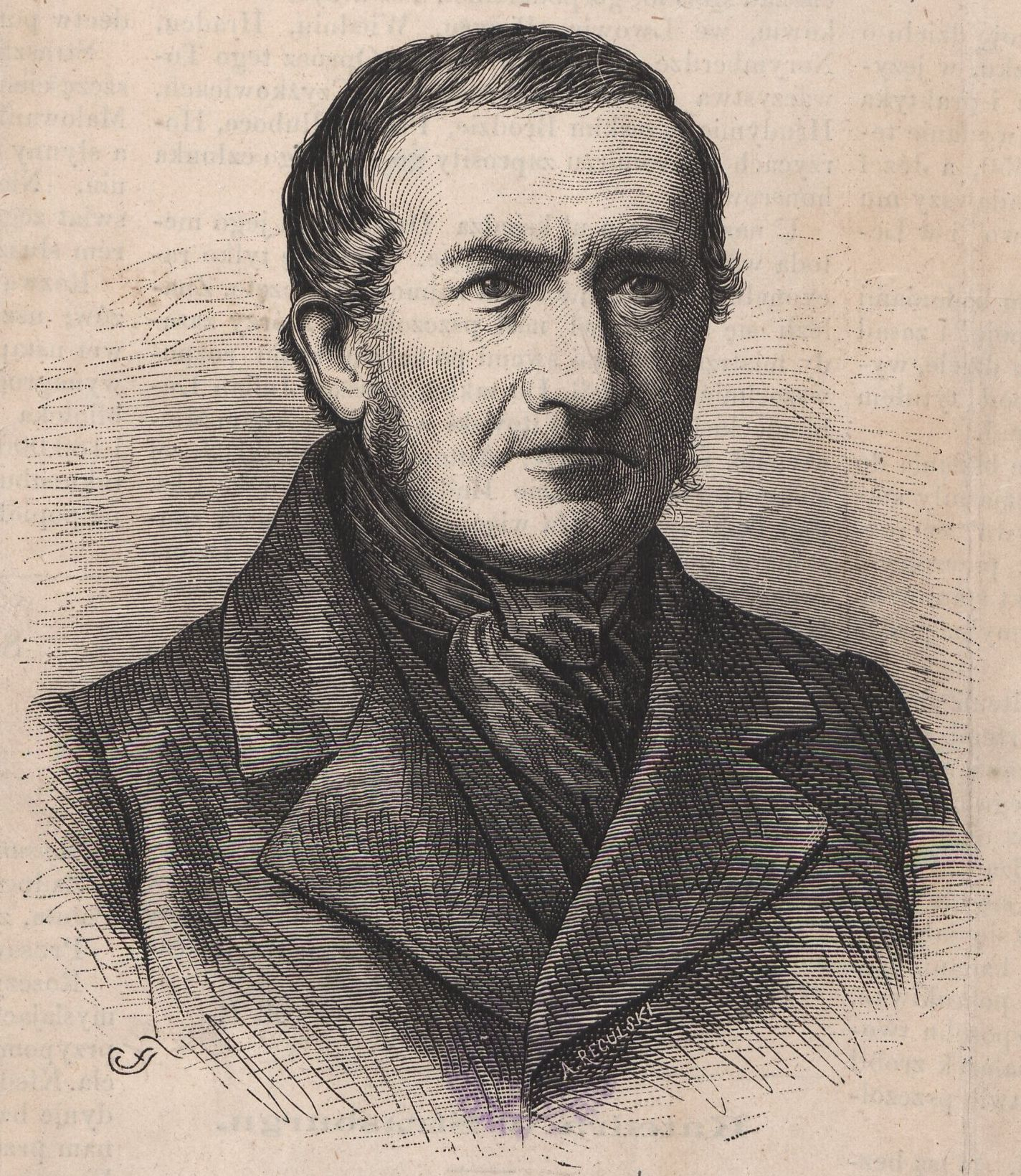 Tygodnik Ilustrowany, nr 167 z 11 marca 1871 r.